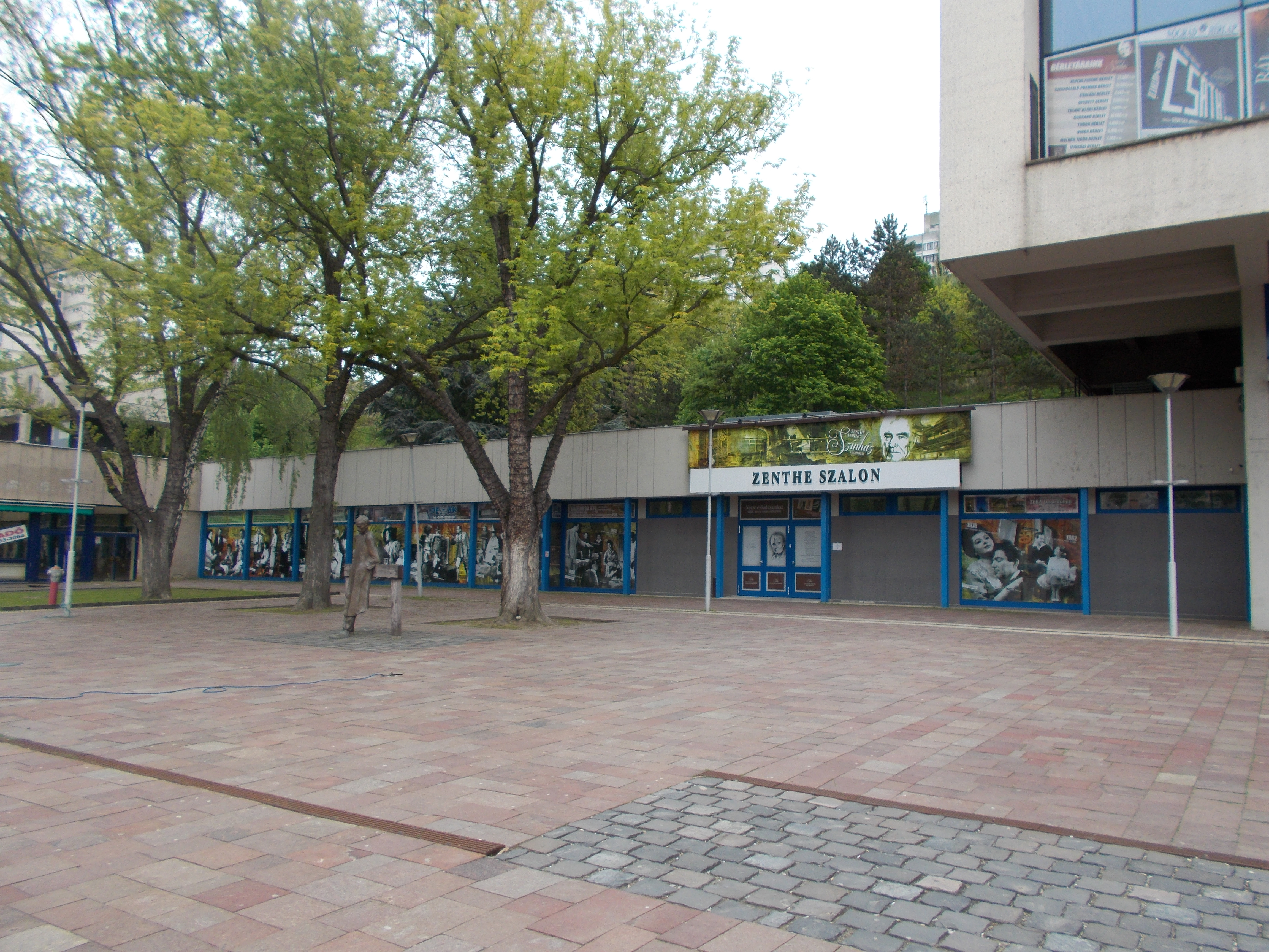 Zenthe Ferenc Színház, Salgótarján